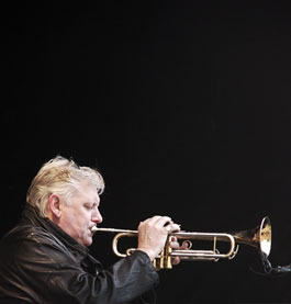 Palle Mikkelborg Foto: Hreinn gudlaugsson